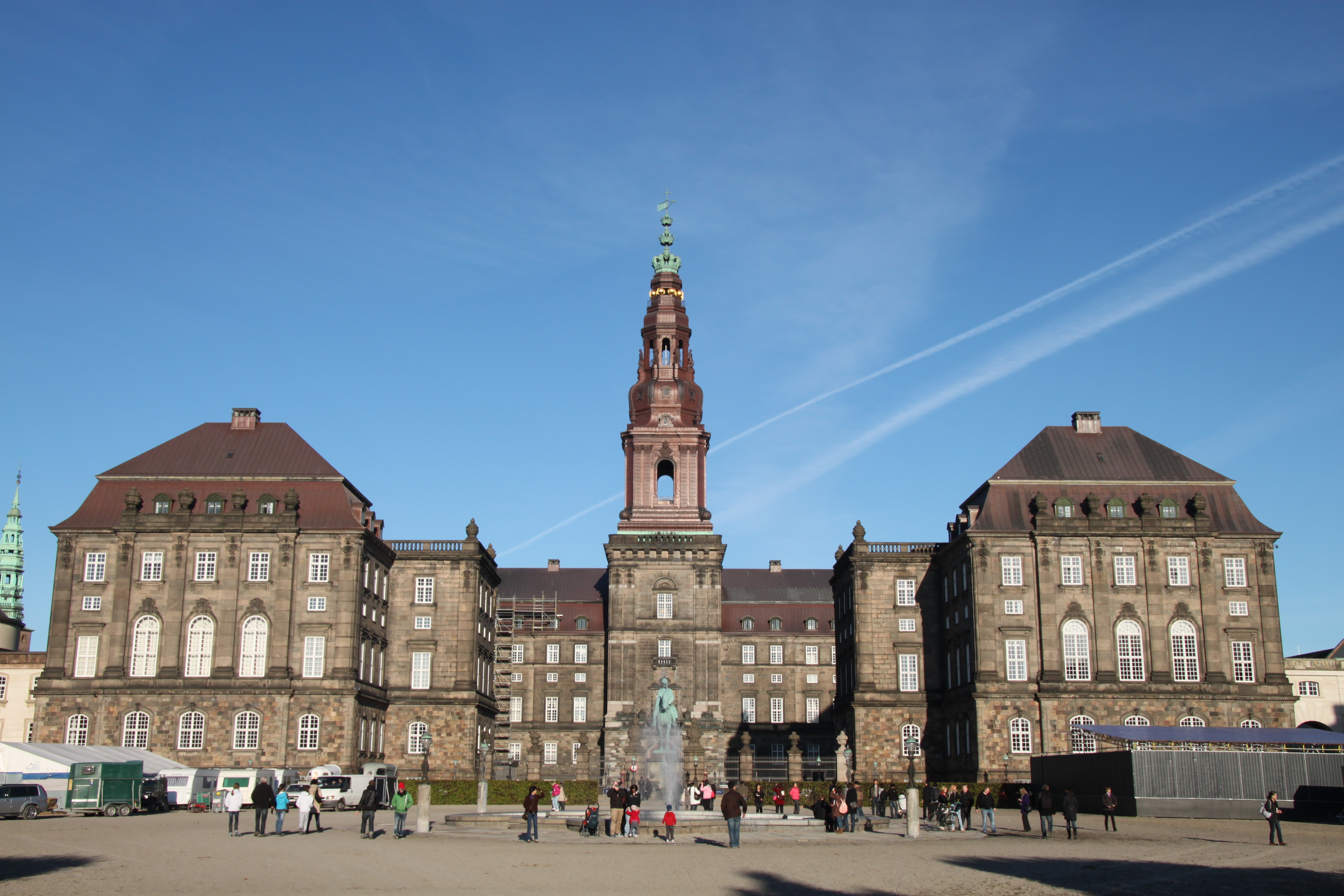 Christiansborg Palace in Copenhagen, Denmark